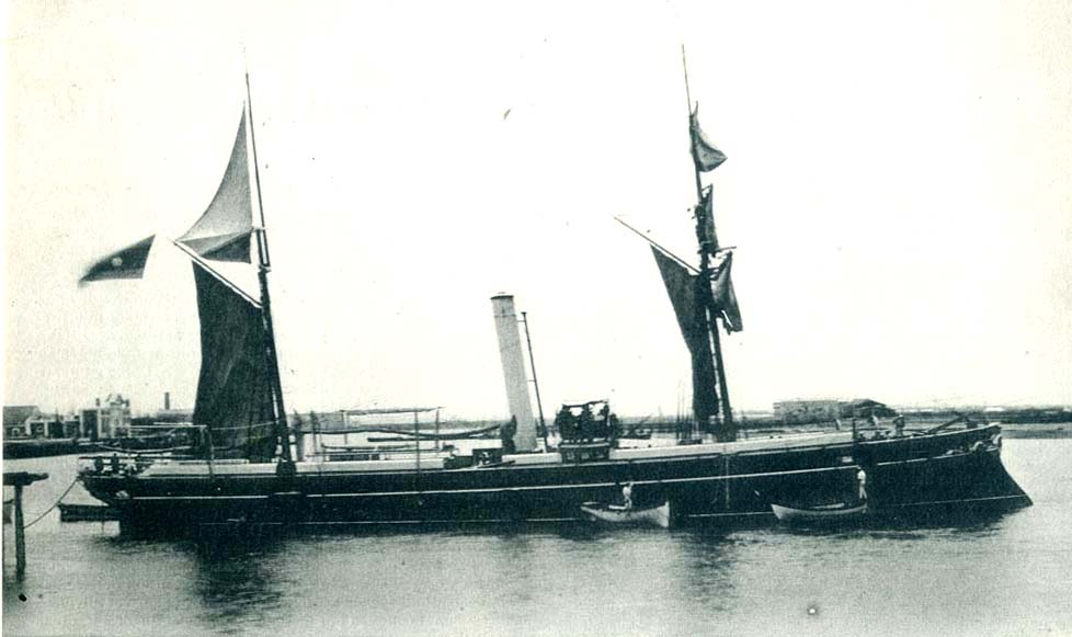 Cañonero de la Armada Española "General Concha", 1897